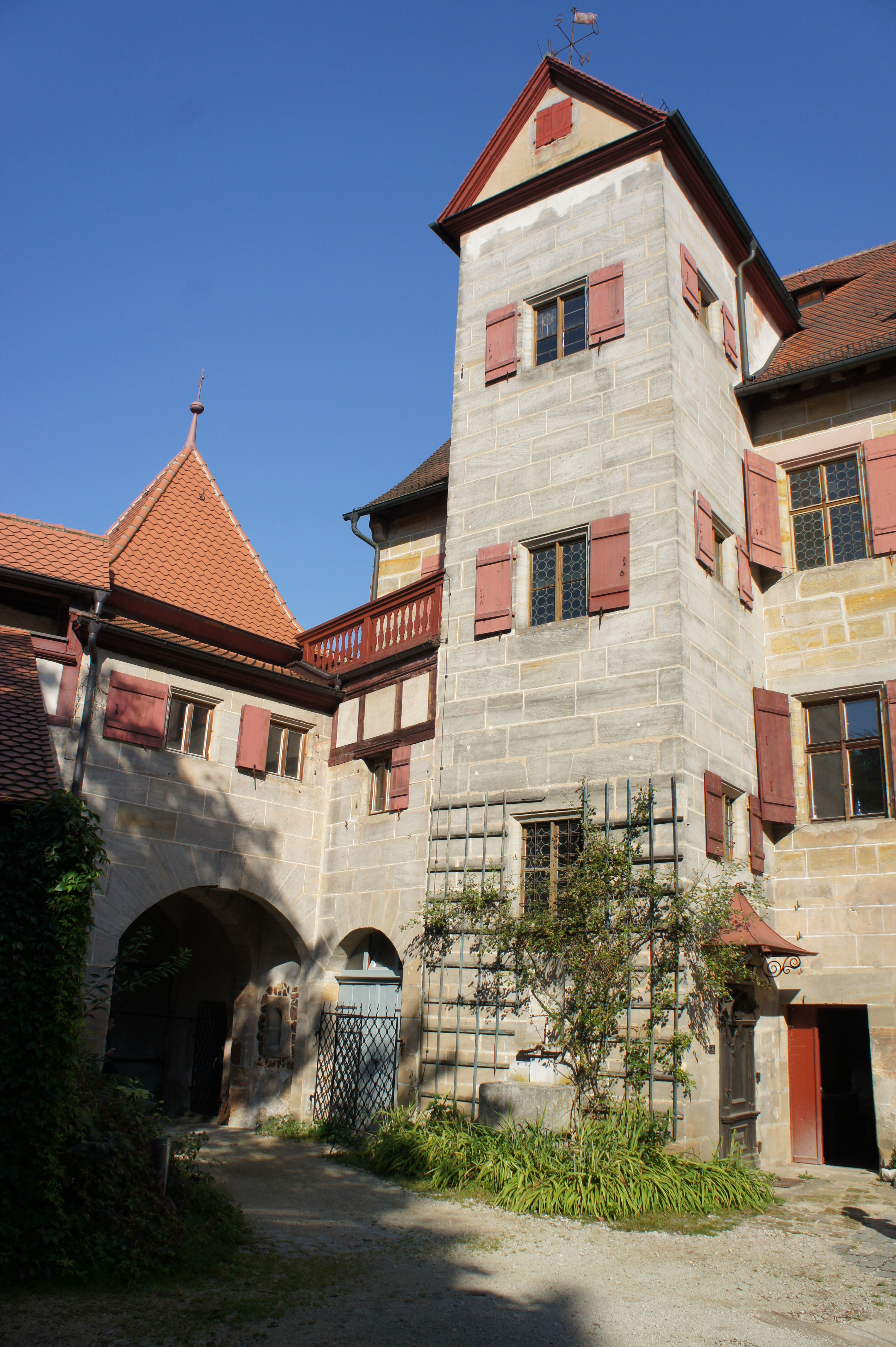 Schloss und Burganlage Grünsberg aus dem 13. Jahrhundert, Landsitz verschiedener Nürnberger Patrizierfamilien, seit dem 18. Jahrhundert im Besitz der Stromer, einer der ältesten und bedeutendsten Patrizierfamilien Nürnbergs. Treppenhaus